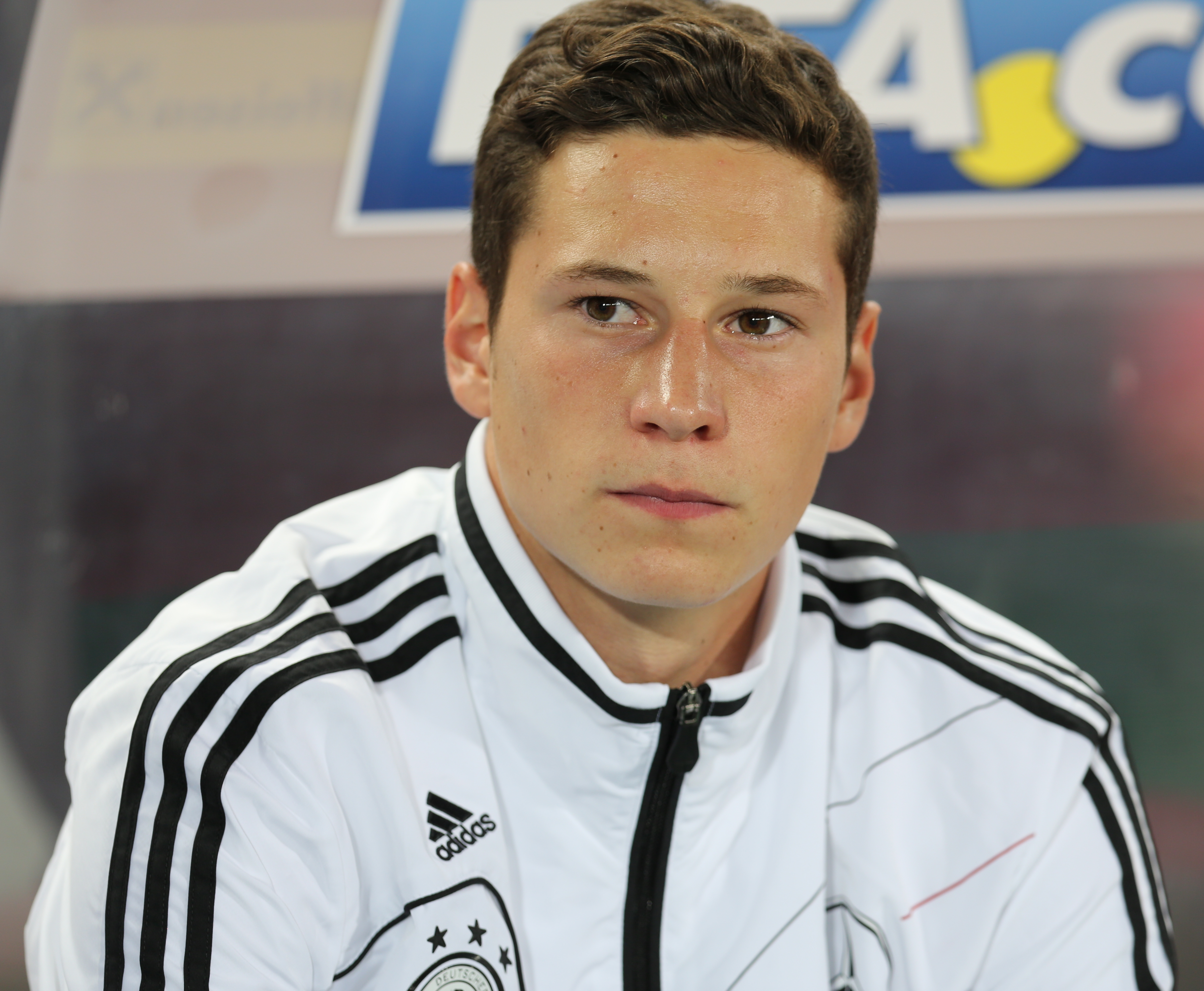 Fußball-Weltmeisterschaft 2014/Qualifikation (UEFA), Gruppe C, 11. September 2012, Österreich gegen Deutschland im Wiener Ernst-Happel-Stadion. The making of this work was supported by Wikimedia Austria. For other files made with the support of Wikimedia Austria, please see the category Supported by Wikimedia Österreich.